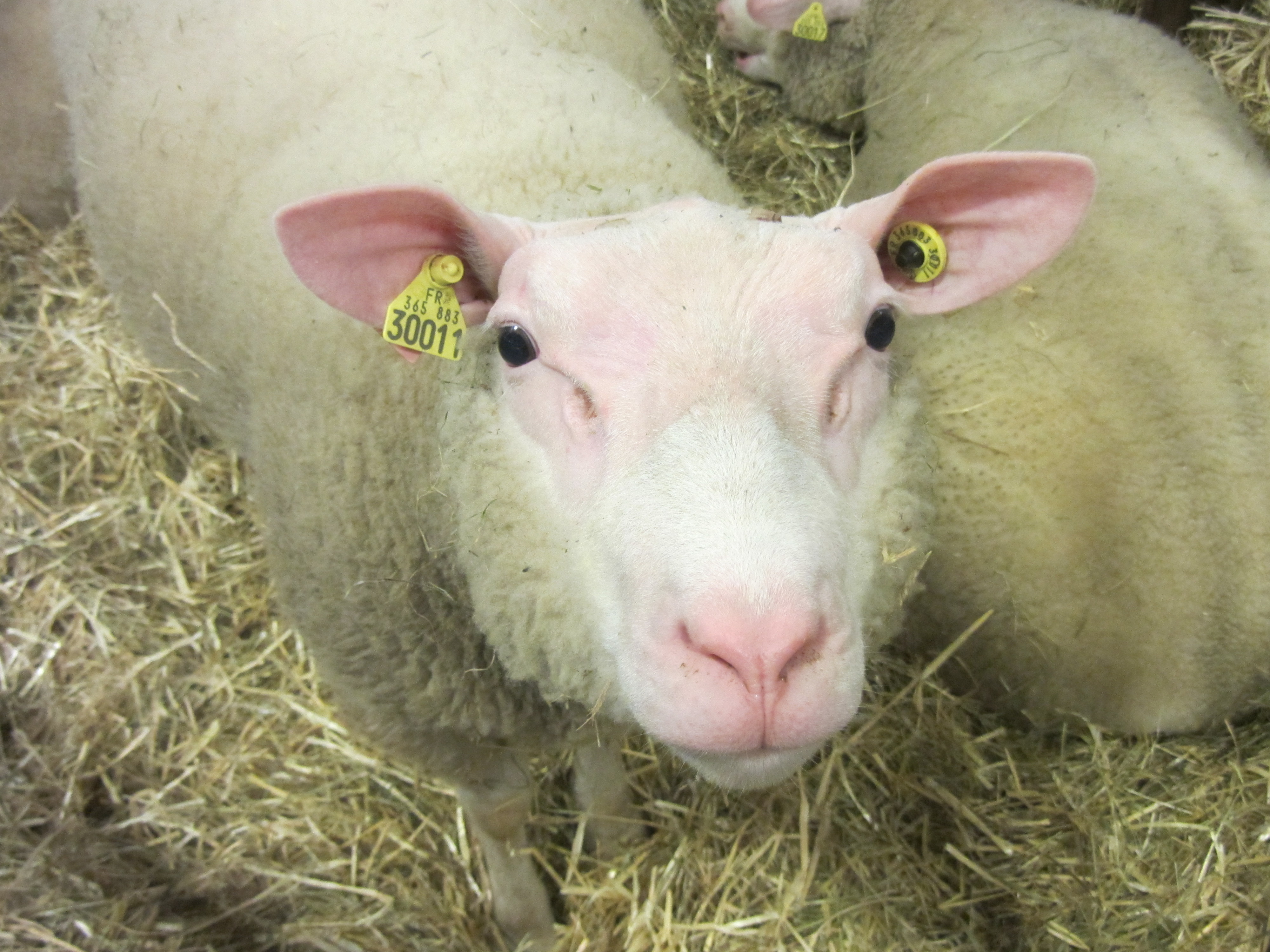 Salon de l'agriculture 2014 - Moutons Cotentin This document was produced using the Canon PowerShot SX230 HS lent by Wikimedia France.